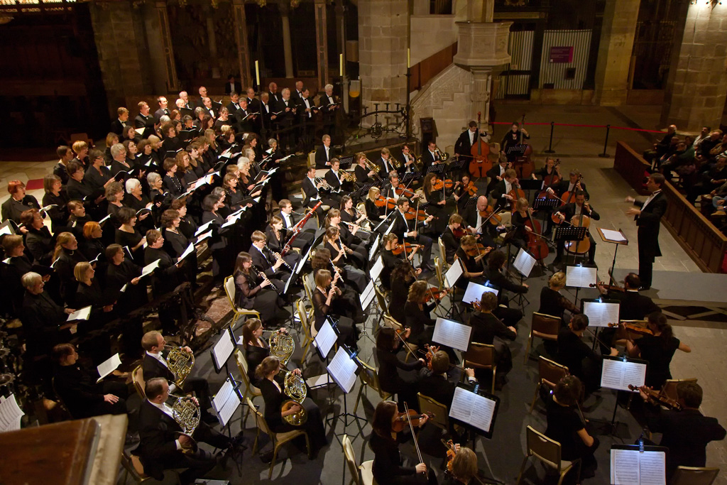 ABACO Orchester